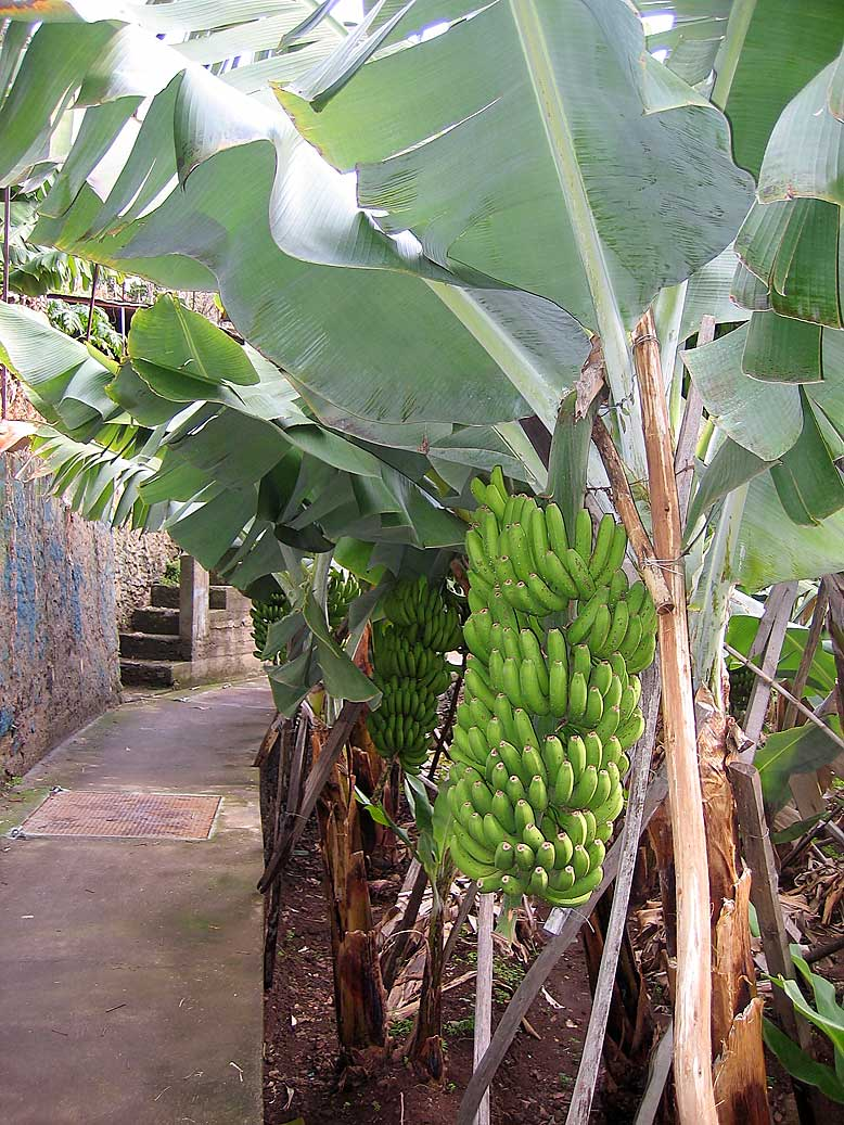 Levada dos Piornais